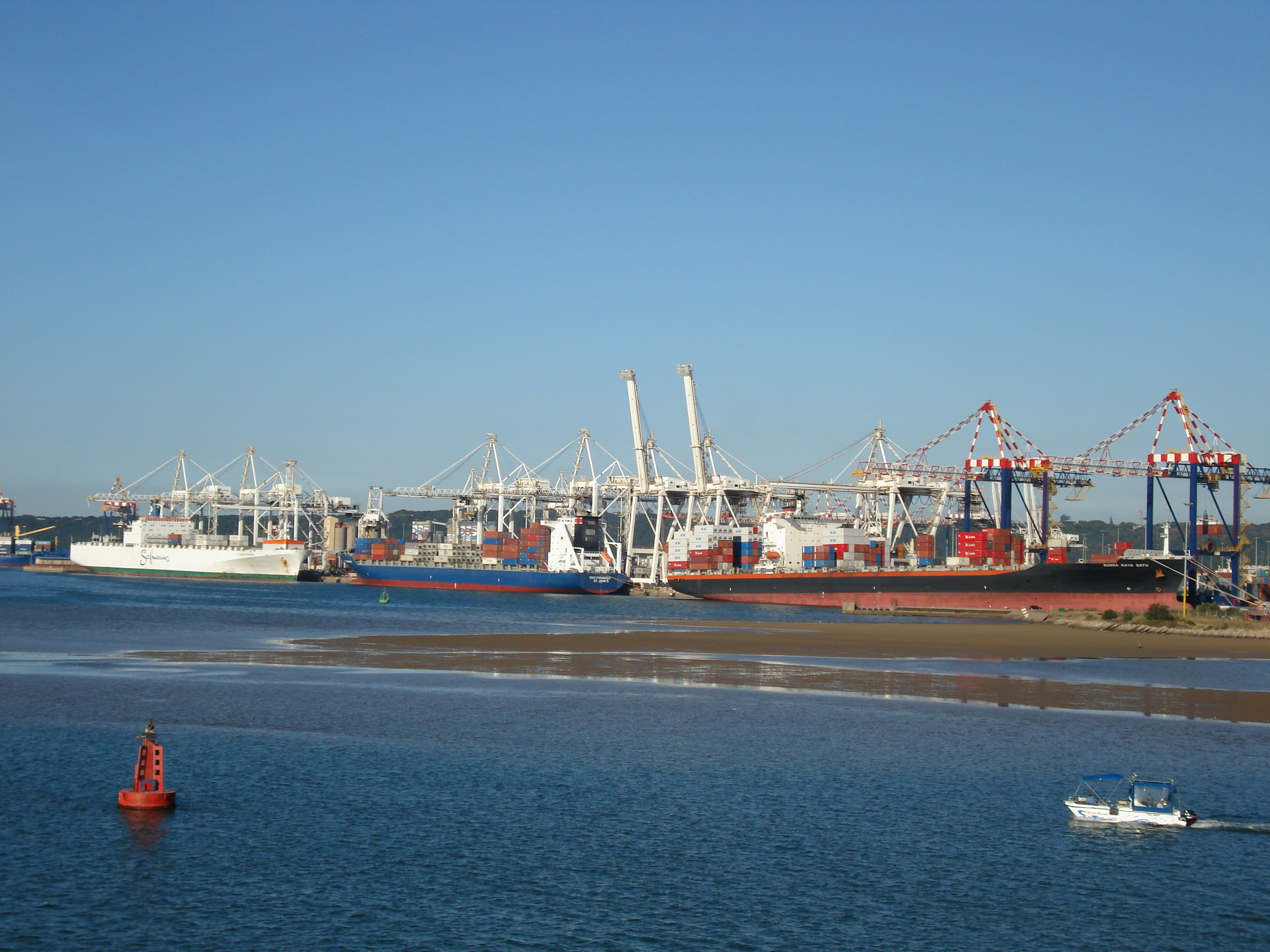 In Durban